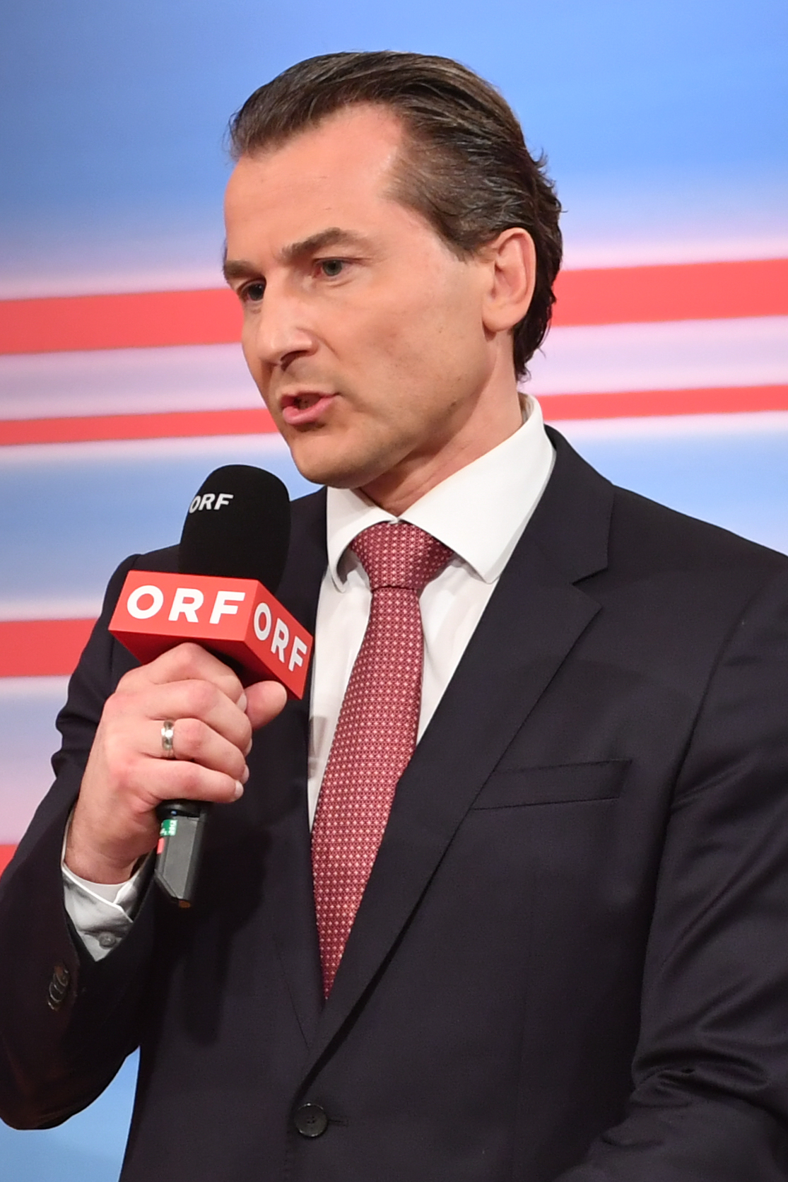 Wahl zum österreichischen Bundespräsidenten am 4. Dezember 2016. Bild zeigt Robert Lugar.